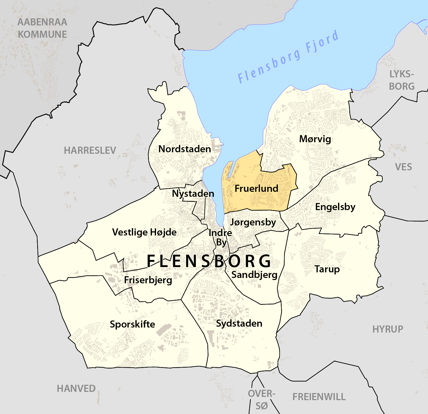 Beliggendhed af Fruerlund i Flensborg Kommune